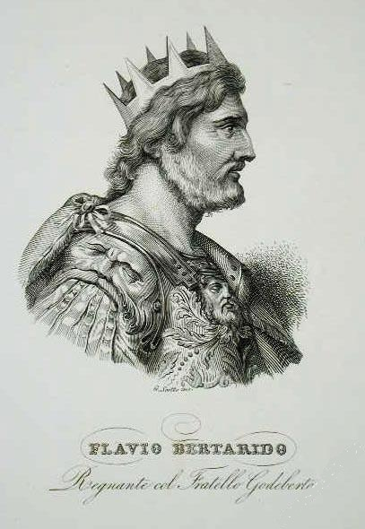 Luogo/soggetto Flavio Bertarido Titolo Flavio Bertarido / Regnante col Fratello Godeberto Autore Scotto G. dis. ed inc. Data 1840 ca. Descrizione Ritratto a mezzobusto di Flavio Bertarido Tecnica incisione in rame